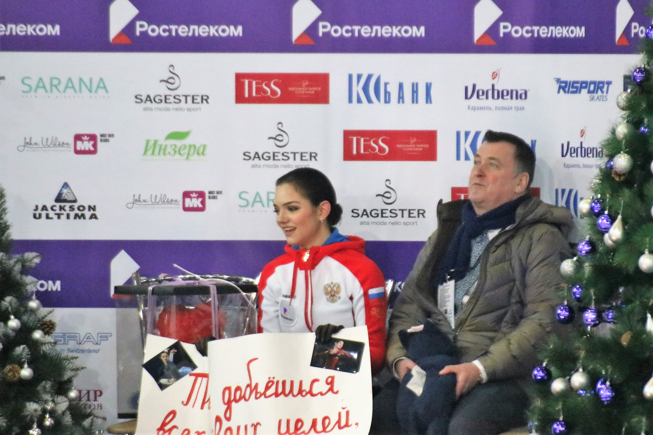 Евгения Медведева со своим тренером Браяном Орсером на чемпионате России по фигурному катанию на коньках 2019